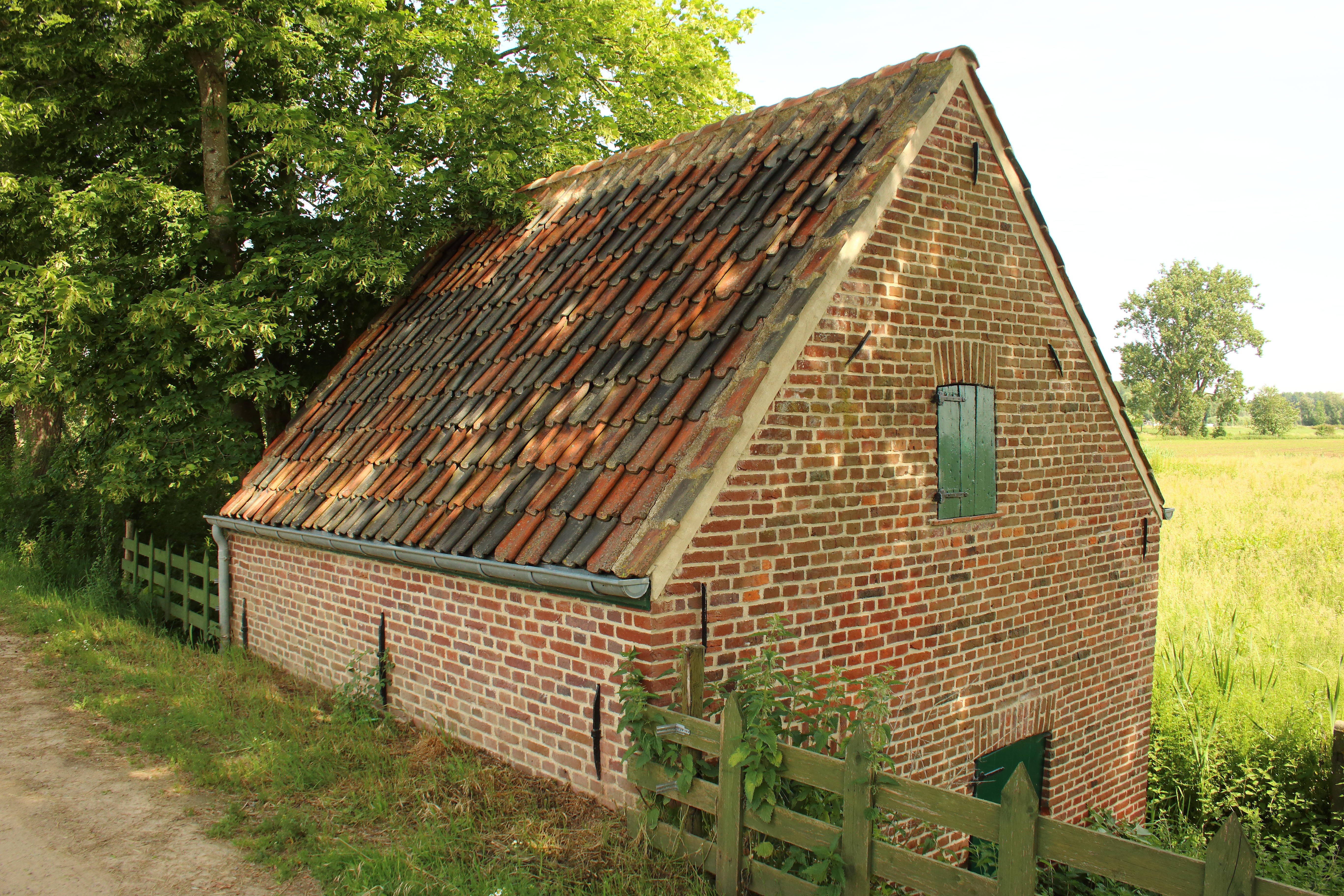 Hof te Wassenhove, Grotenberge, Zottegem, Vlaanderen, België